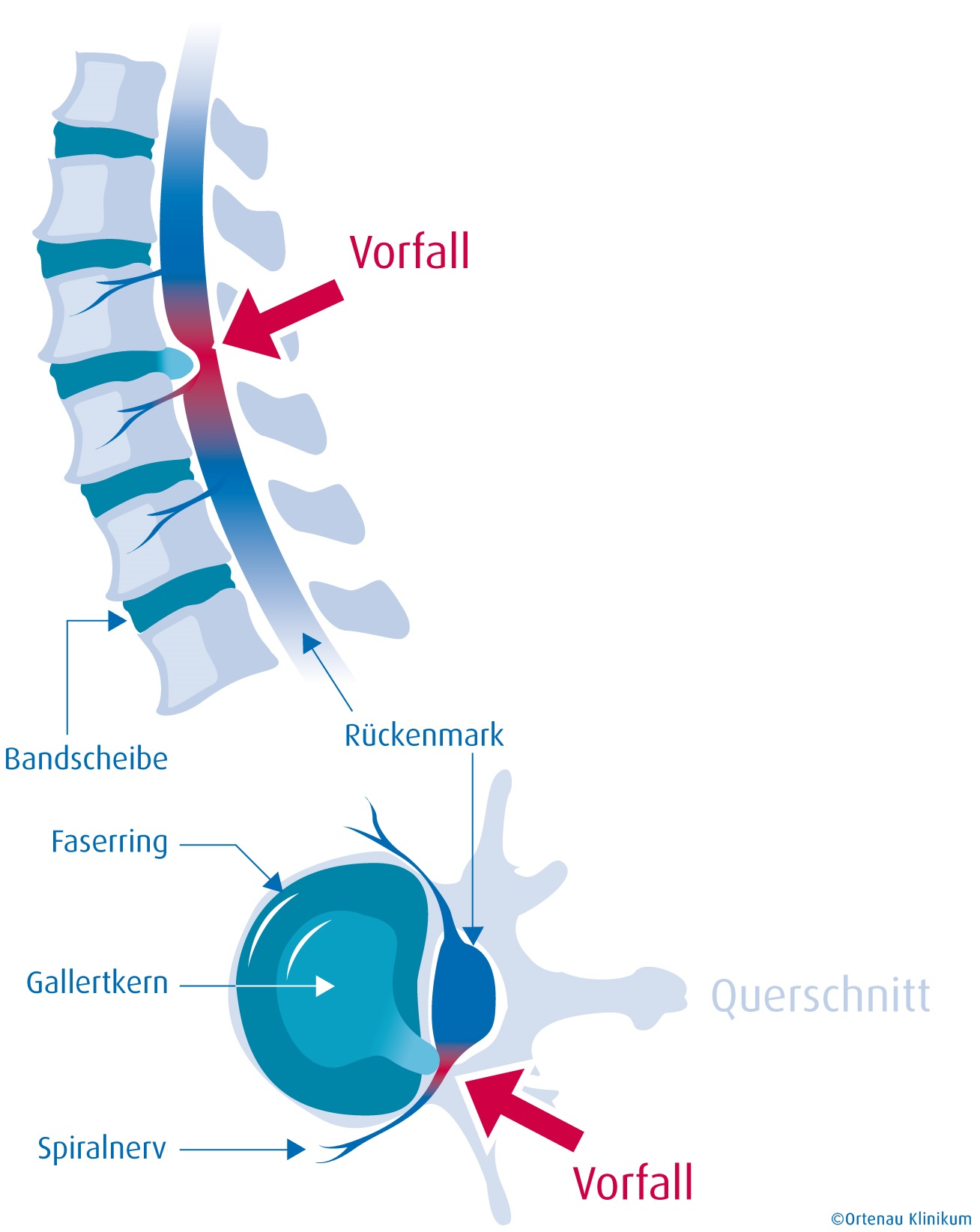 Schaubild Bandscheibenvorfall